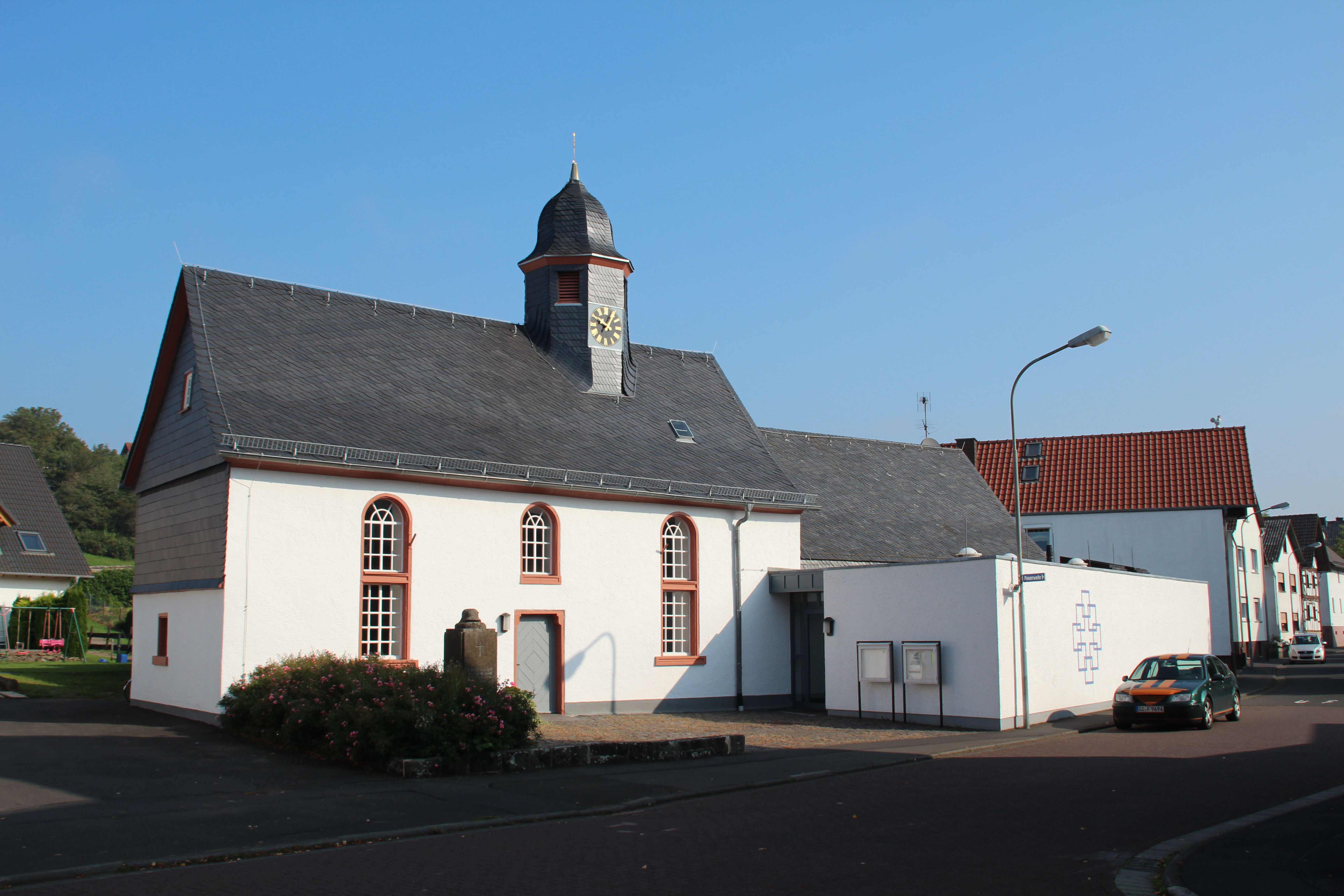 Evangelische Kirche Bersrod, Gemeinde Reiskirchen, Landkreis Gießen, Hessen, Deutschland